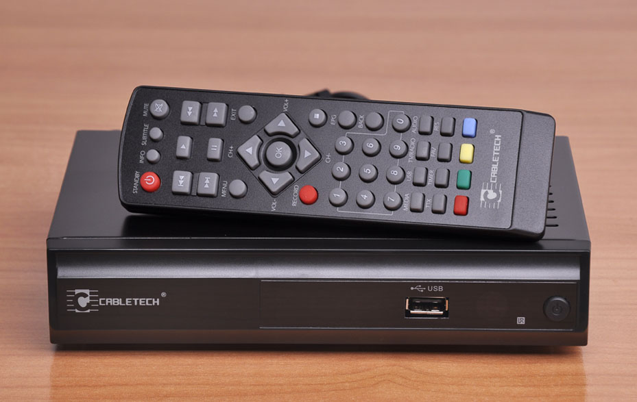 Tuner DVB-T MPG4 HD do naziemnej telewizji cyfrowej